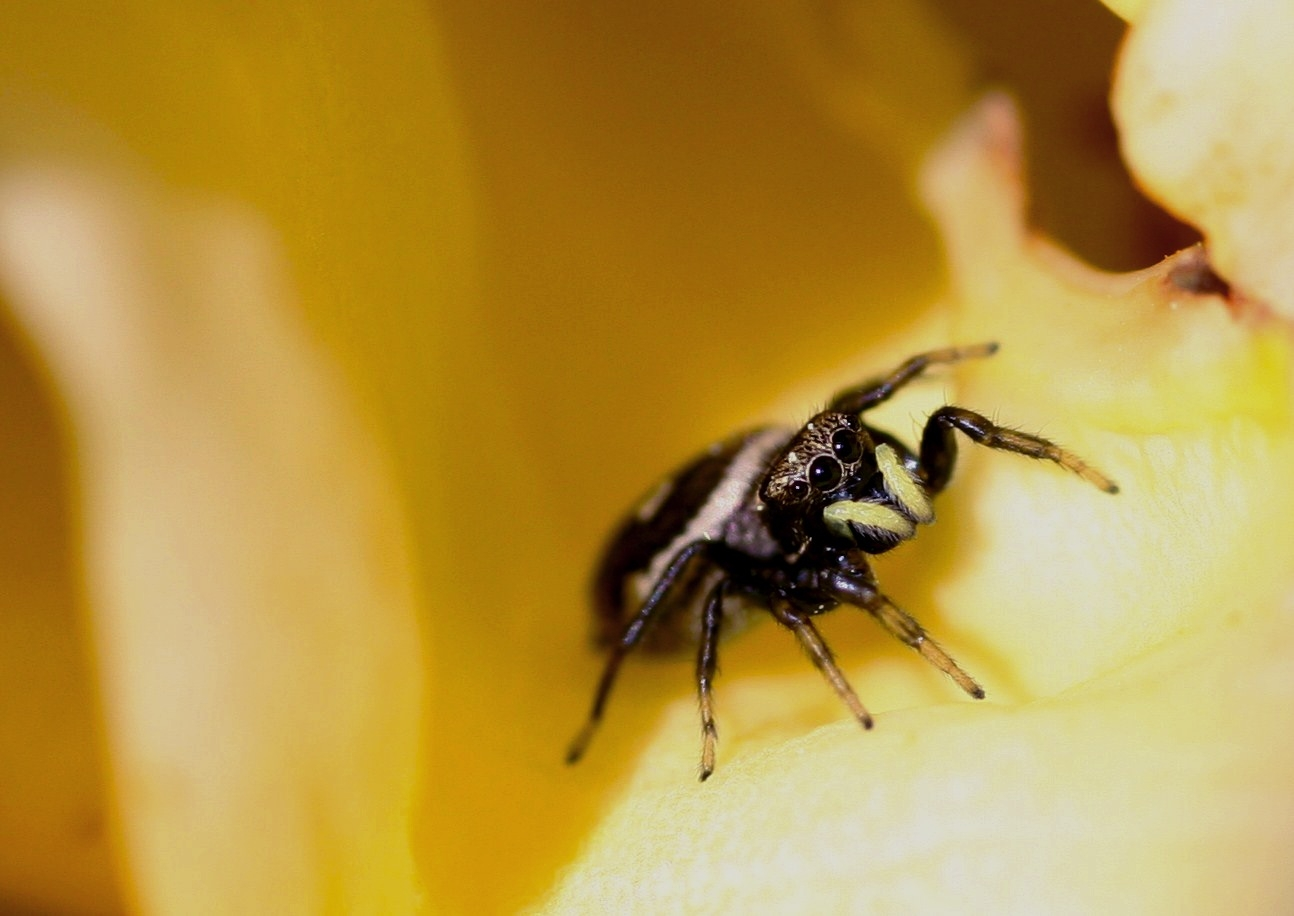 Heliophanus (Salticidae)